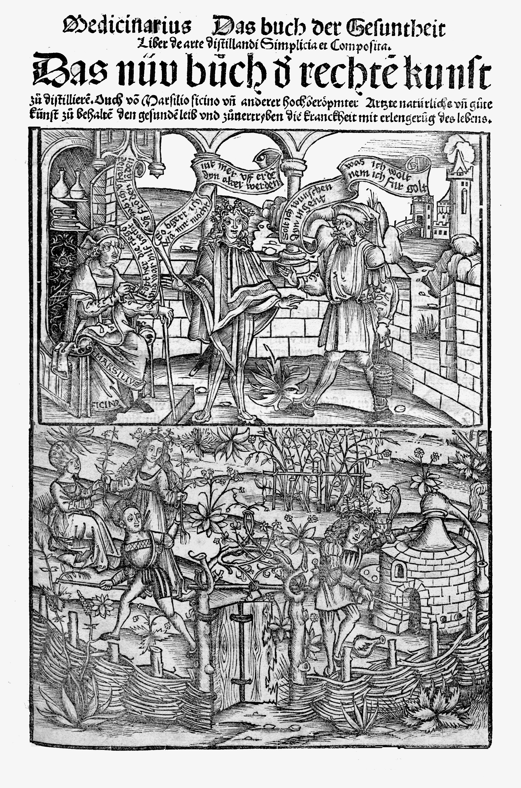 Titelblatt